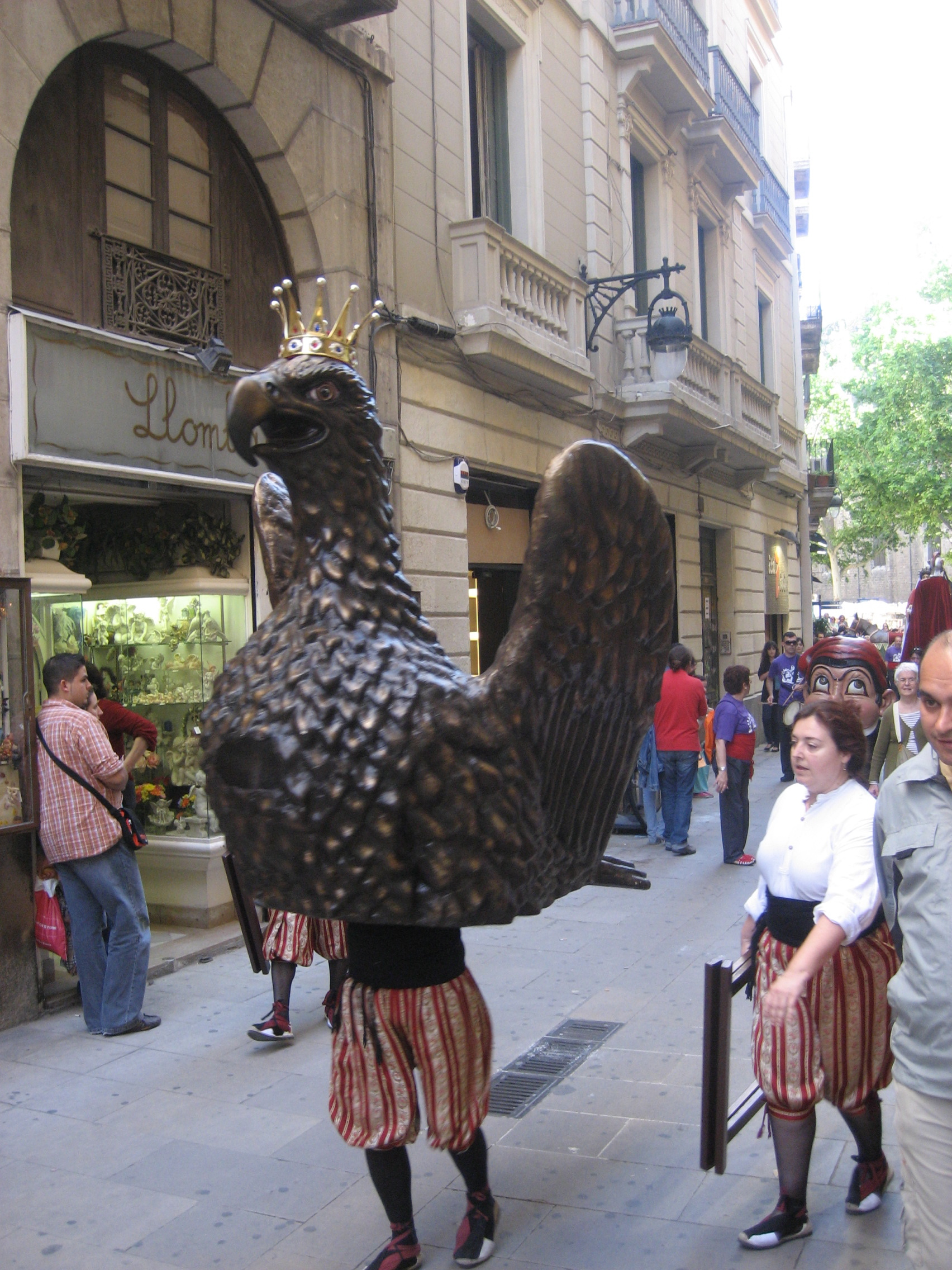 Àliga de Barcelona, al barri de la Ribera. Any 2008